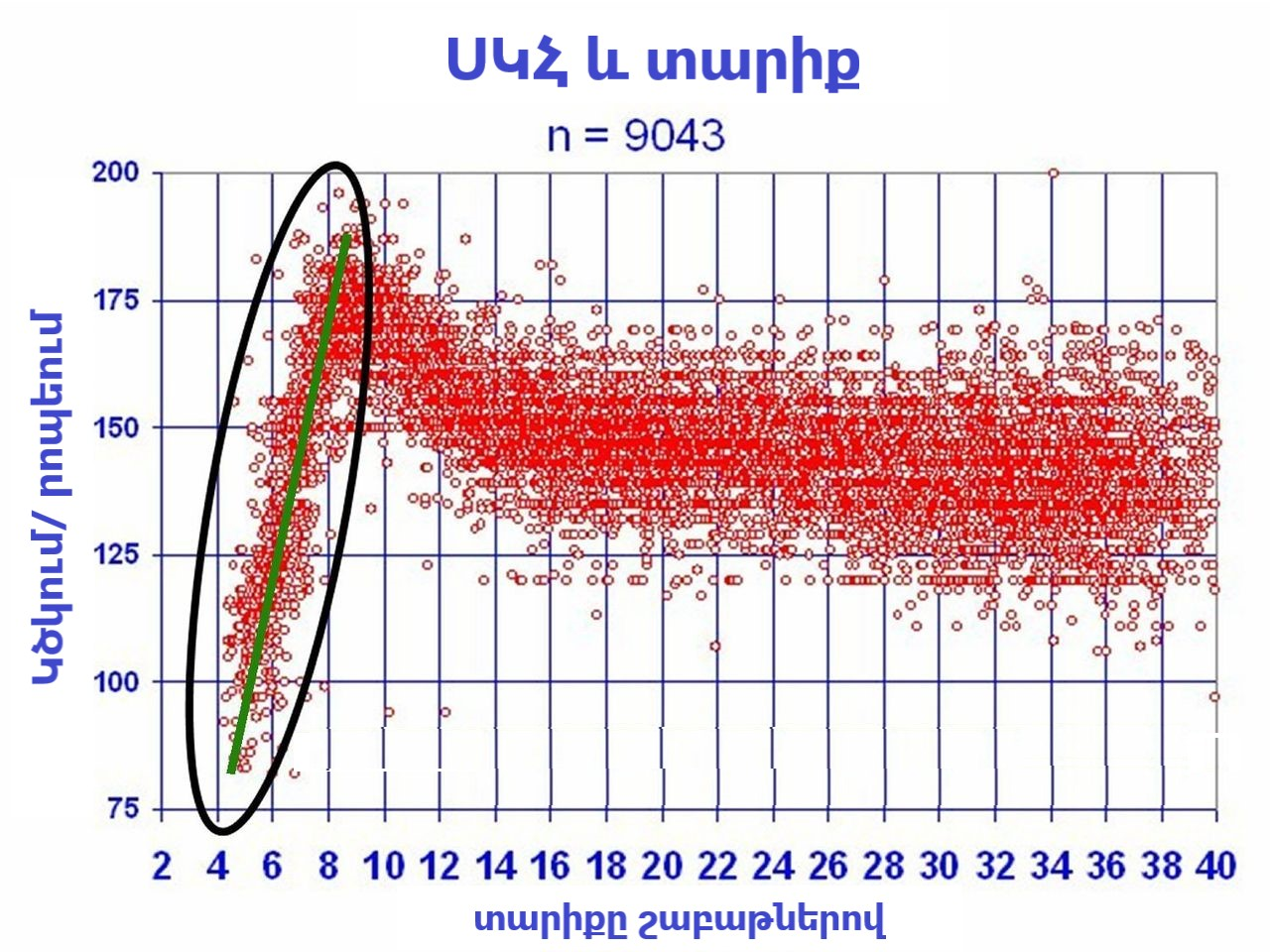 ՍԿՀ և տարիք